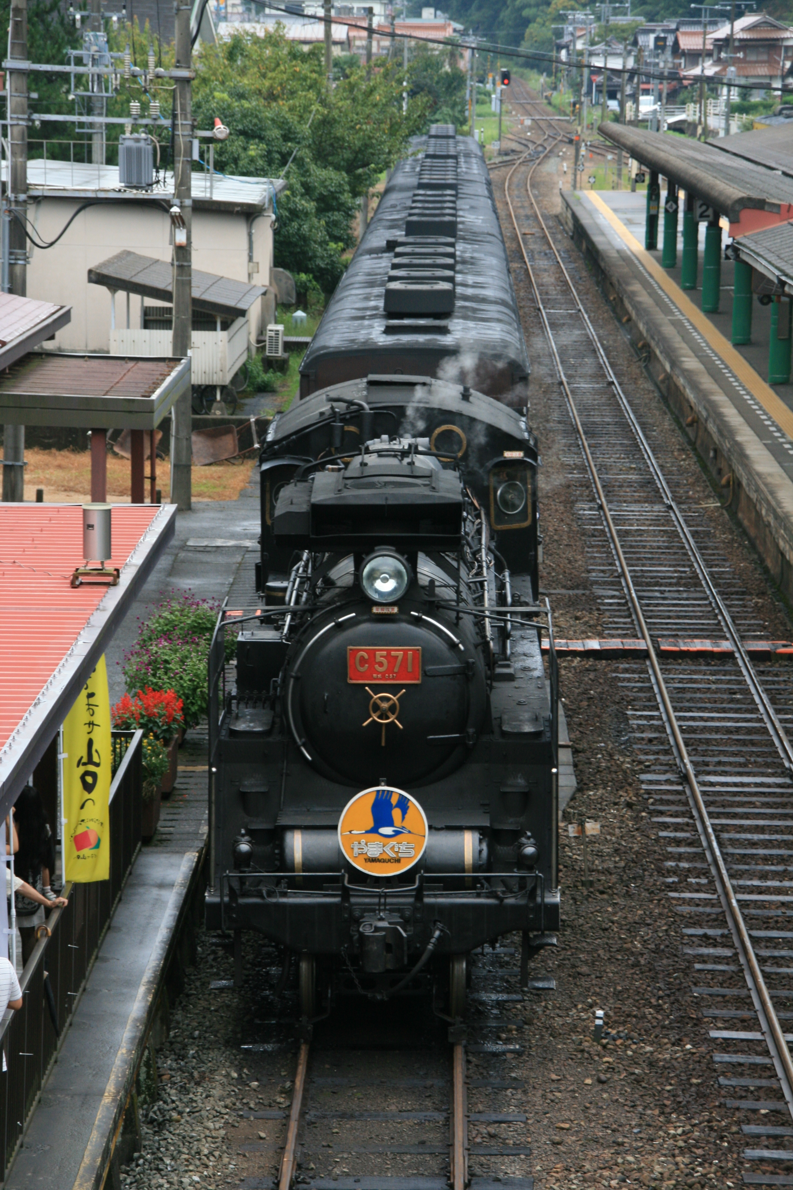 SLやまぐち号。津和野駅にて。